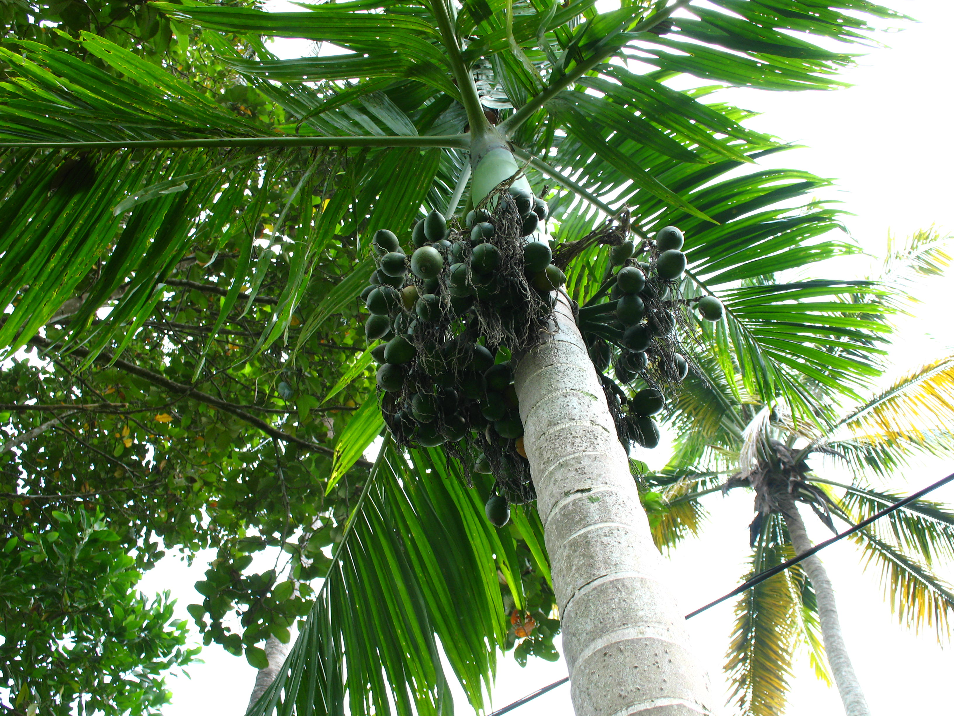 Kavungu